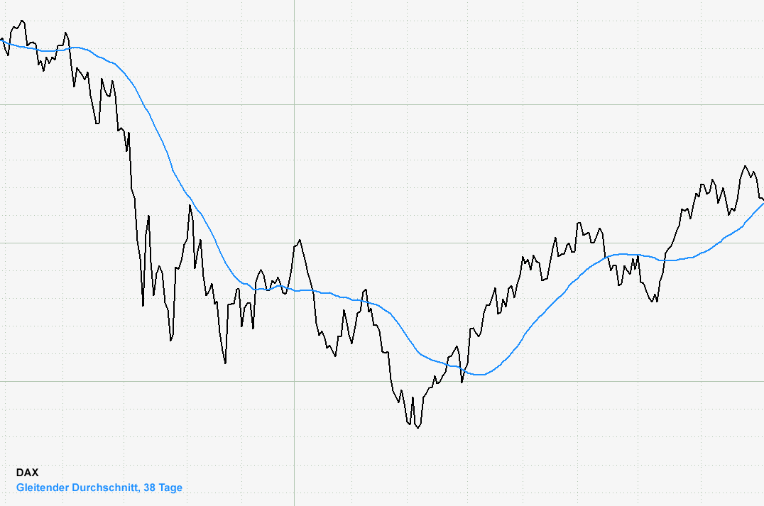 Dax mit 38 Tage Linie